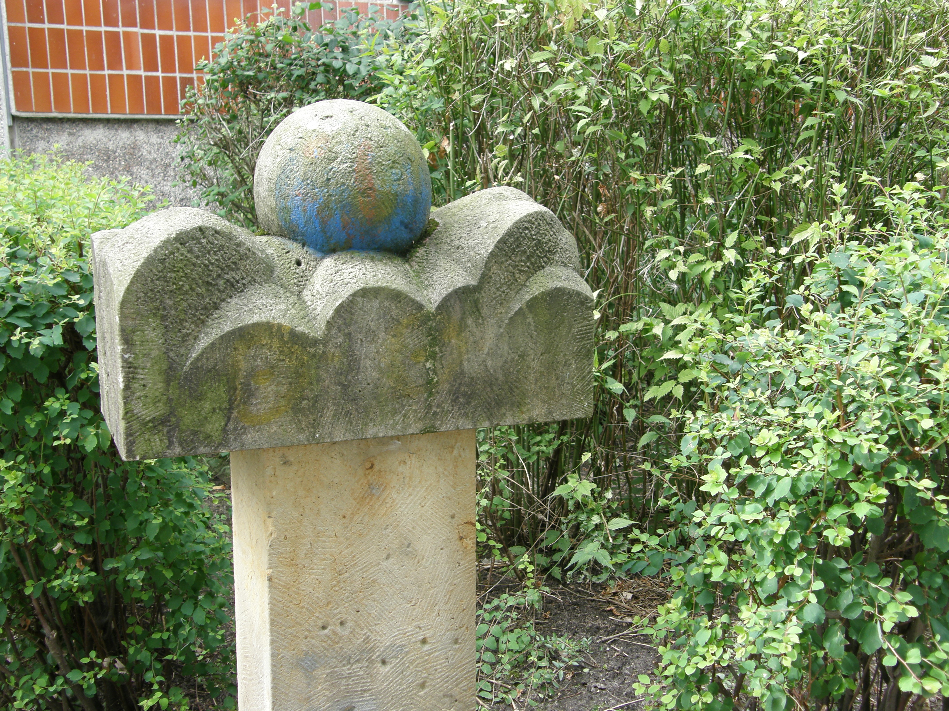 Hellersdorf, Zossener Straße: Hauseingangszeichen vor den Häusern 70-76 und 78-84 von Karl-Günter Möpert und Marguérite Blume-Cardenàs; 1991